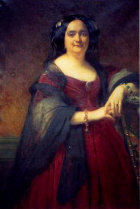 Madame Emile Pereire, née Rachel Herminie Rodrigues Henriques (1805-1874)